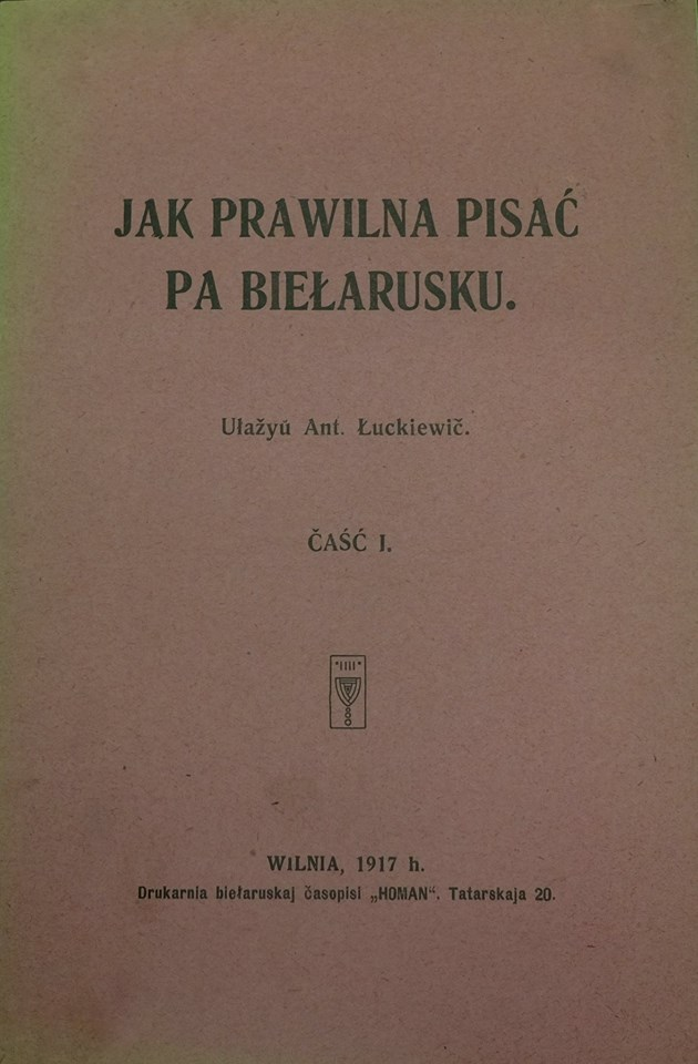 Вокладка кнігі Антона Луцкевіча Jak prawilna pisać pa biełarusku.